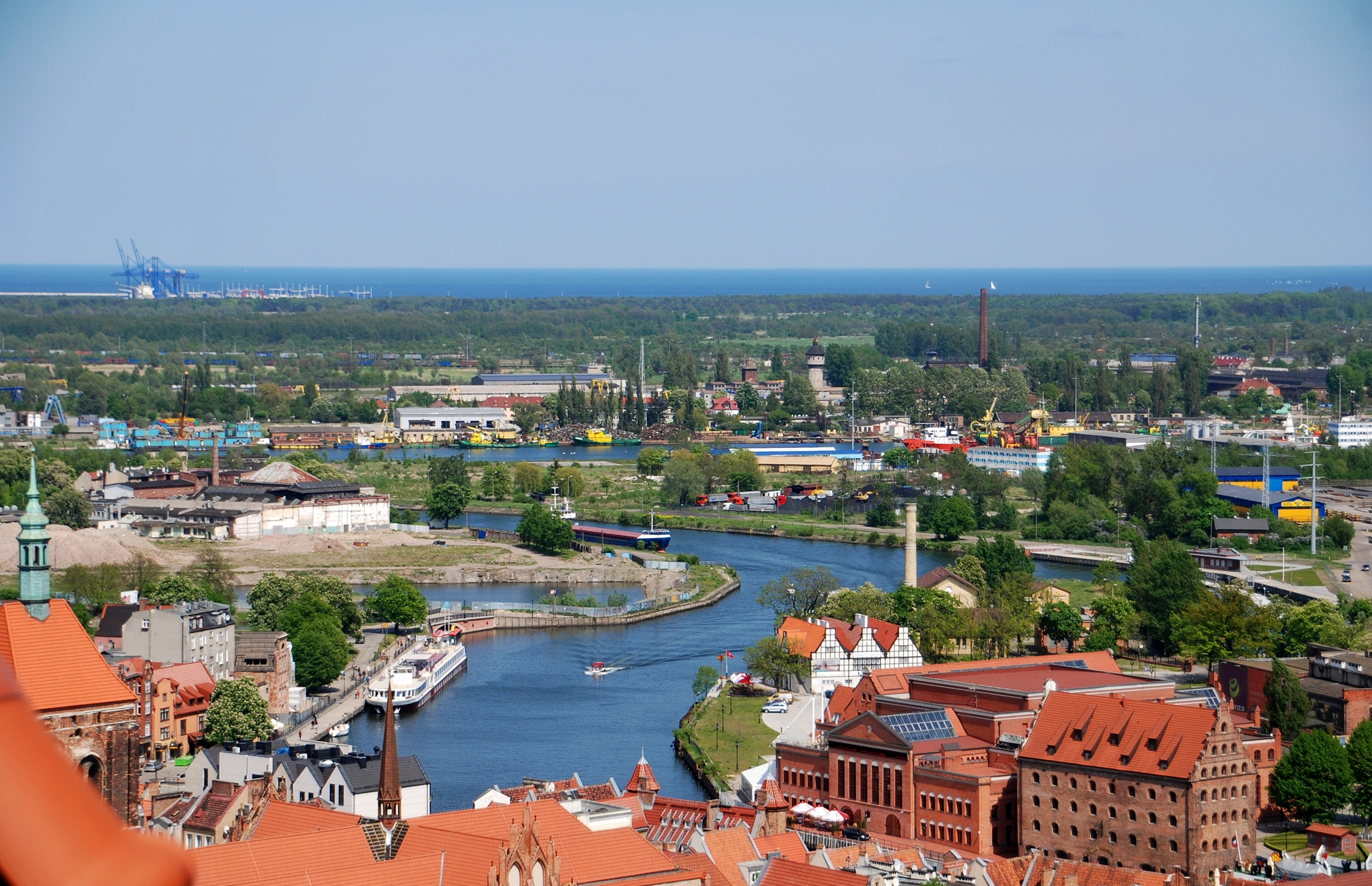 Gdańsk, widok na Motławę i Brabank.